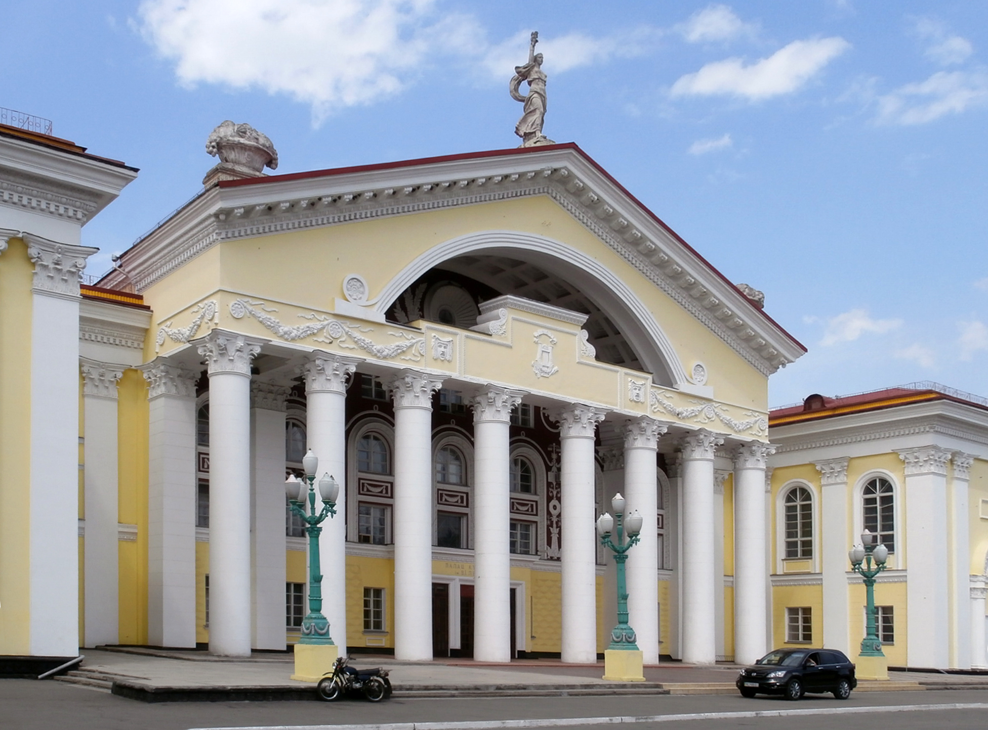 Palast der Kultur in Schowti Wody Haupteingang